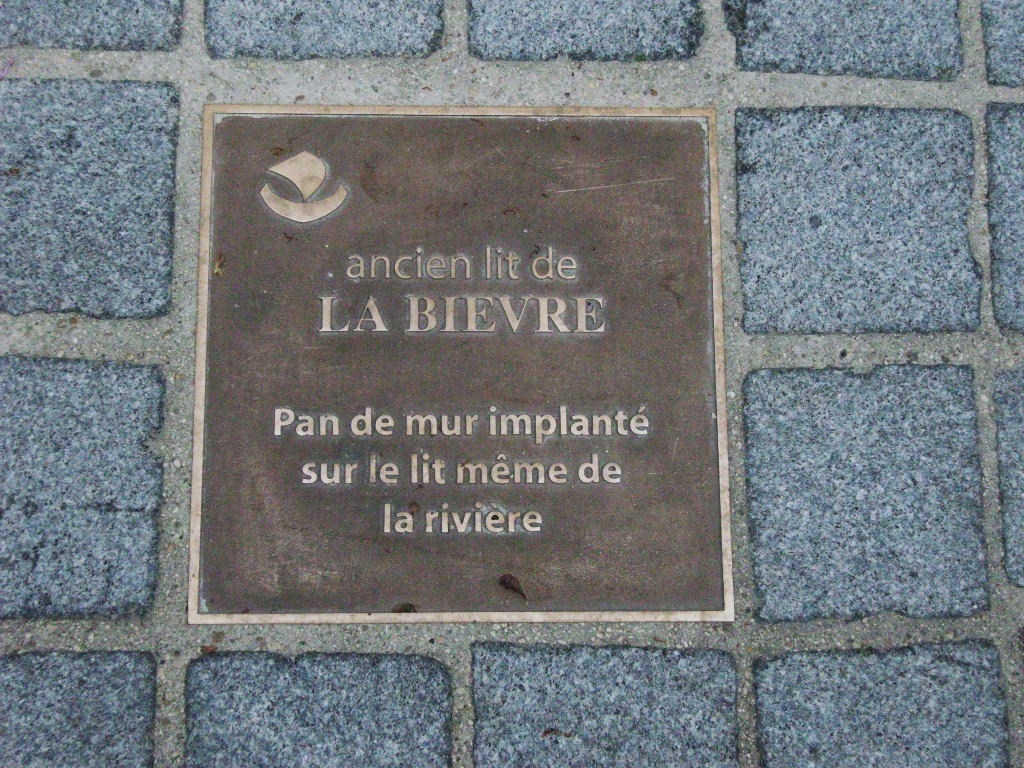 Paris 13e, 38-40 rue de la Colonie, plaque au sol indiquant le mur construit au milieu de l'ancien lit de la Bièvre